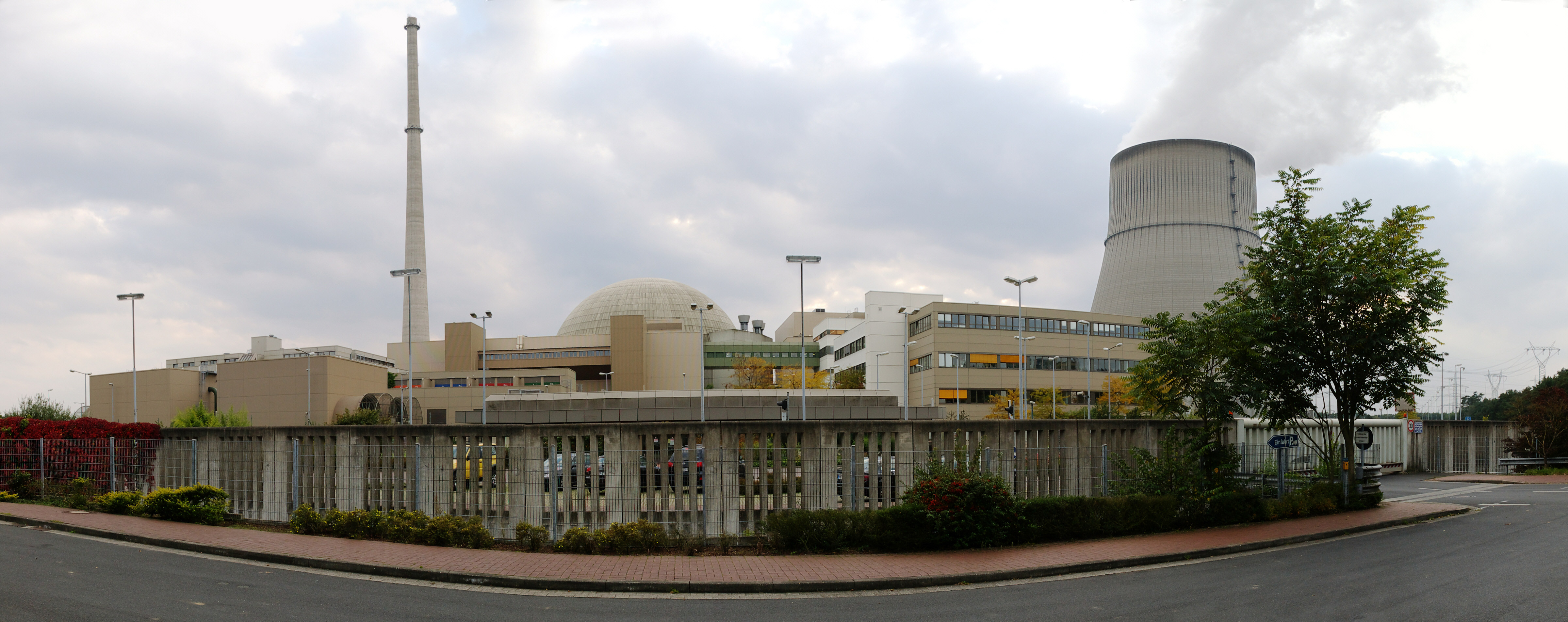 KKW Emsland This panoramic image was created with Autostitch (stitched images may differ from reality).